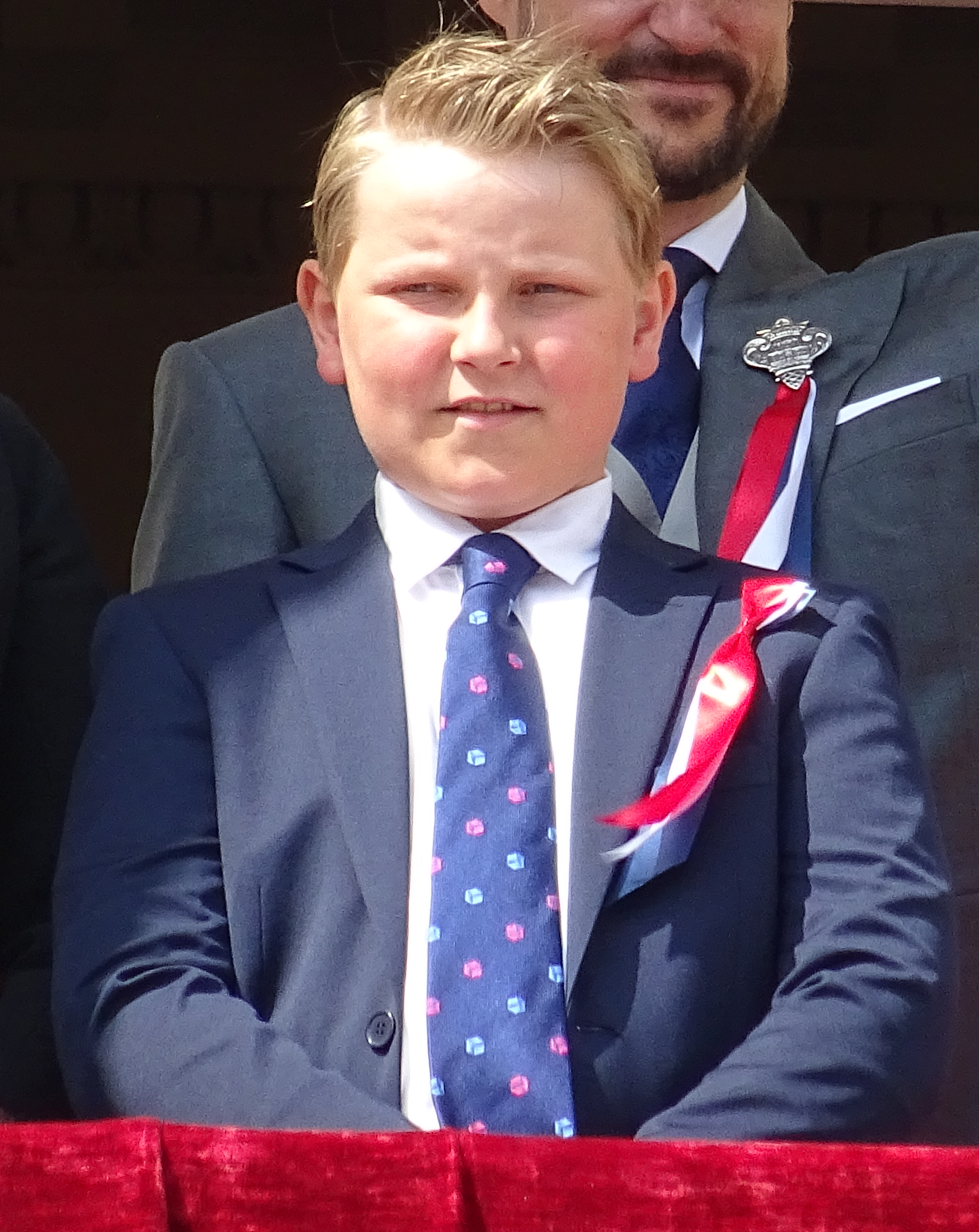 Sverre Magnus, le 17 mai 2018 à Oslo